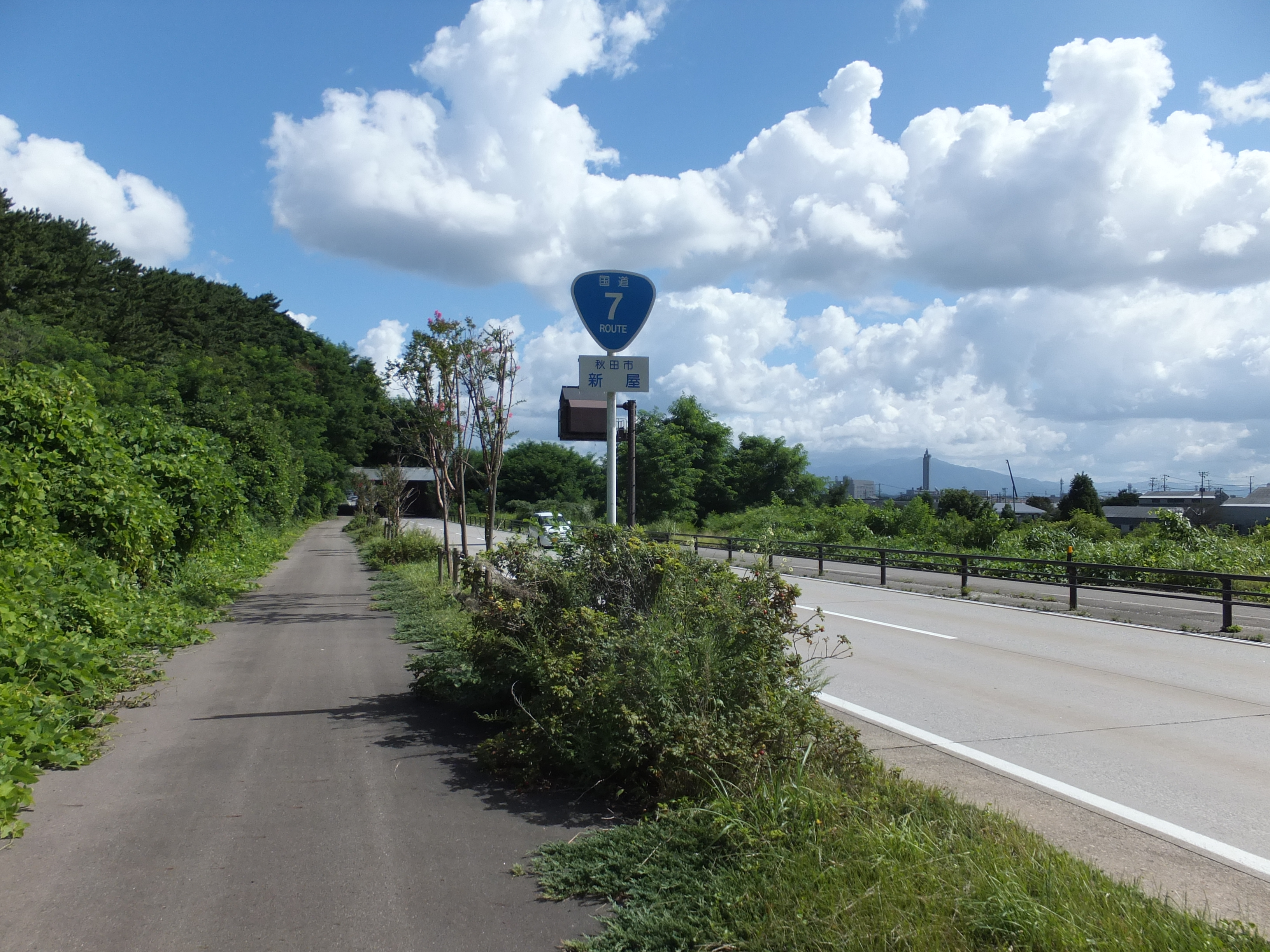 国道7号秋田南バイパス、秋田市新屋にて。右手に見える尖塔は秋田朝日放送本社。